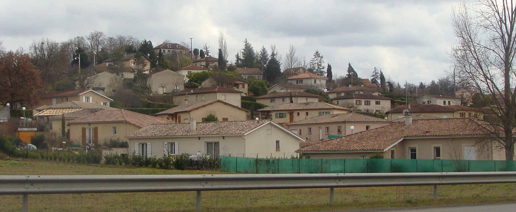 Preignan vue du ouest depuis le Route national 21.